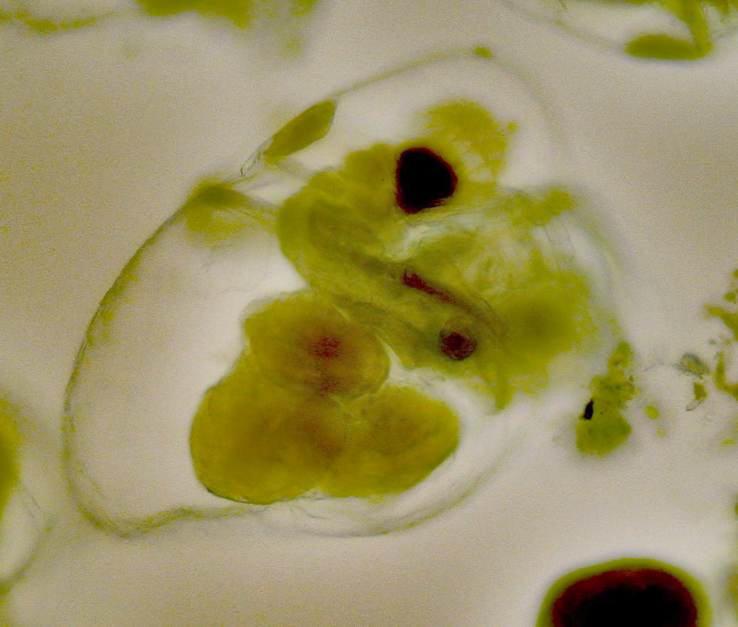 P. tergestina